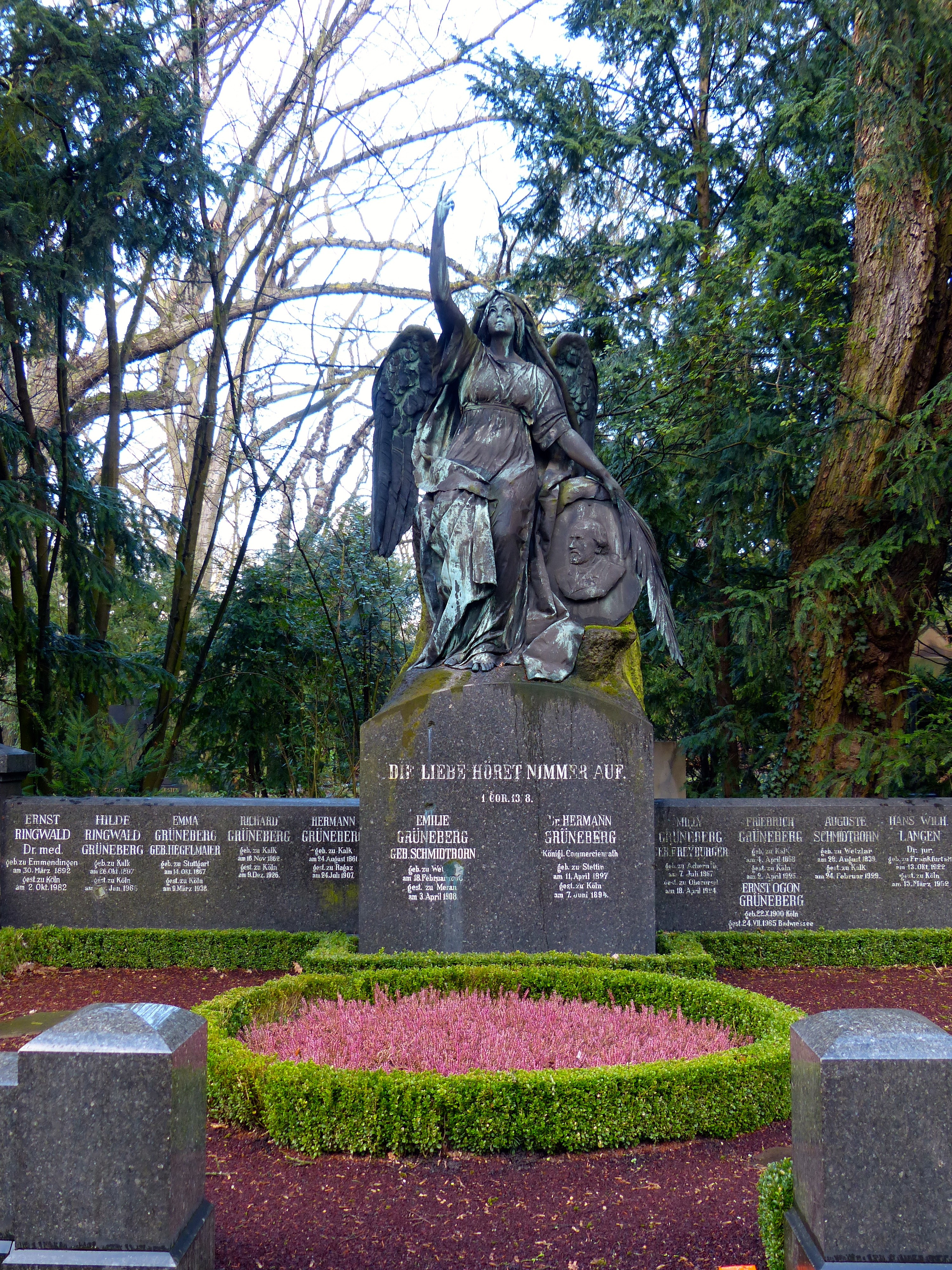 Grabstelle auf dem Melaten-Friedhof: Familiengrab Grüneberg